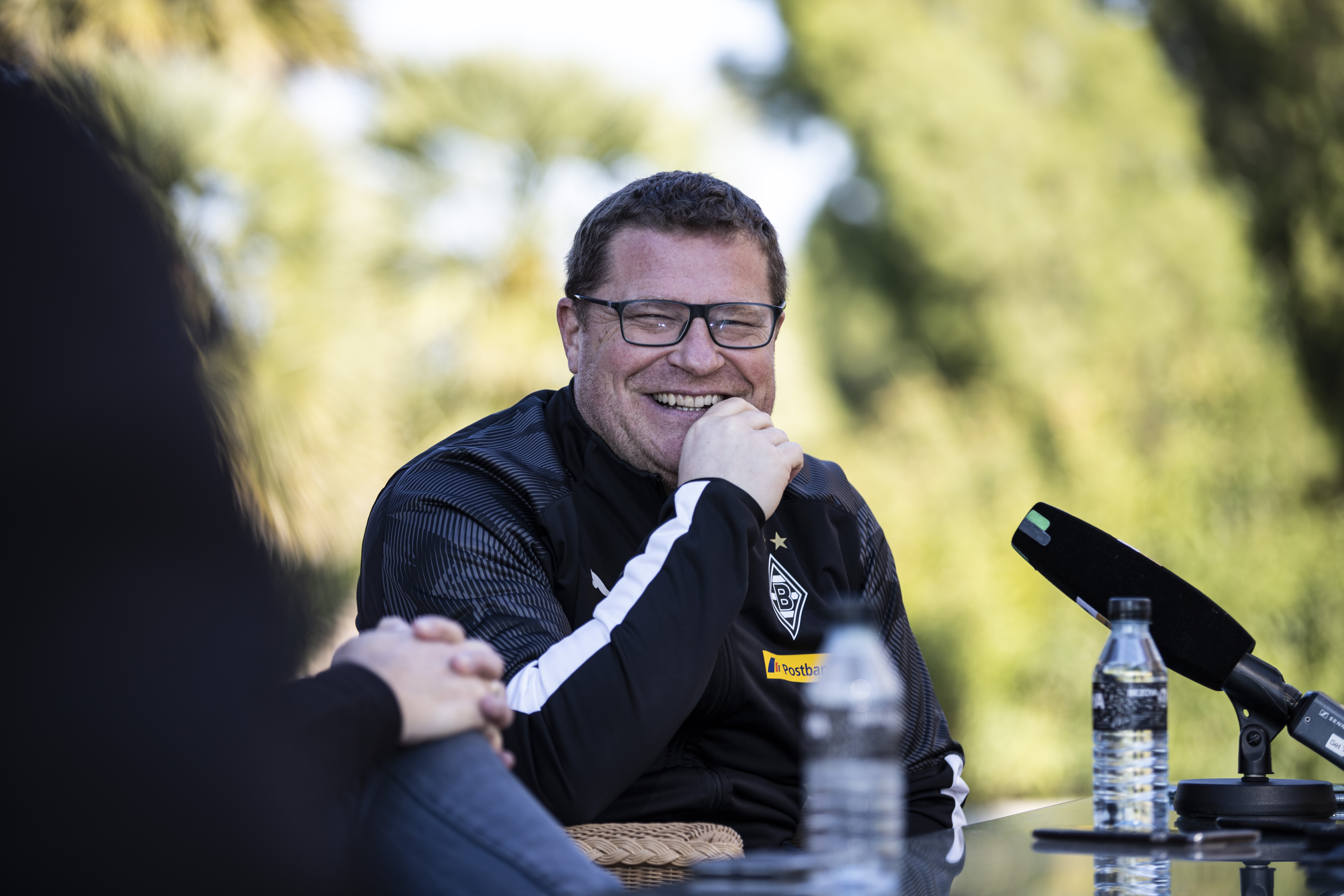 Max Eberl